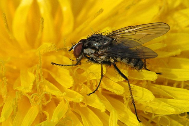 Picture taken in Commanster, Belgian High Ardennes . Species: Delia radicum